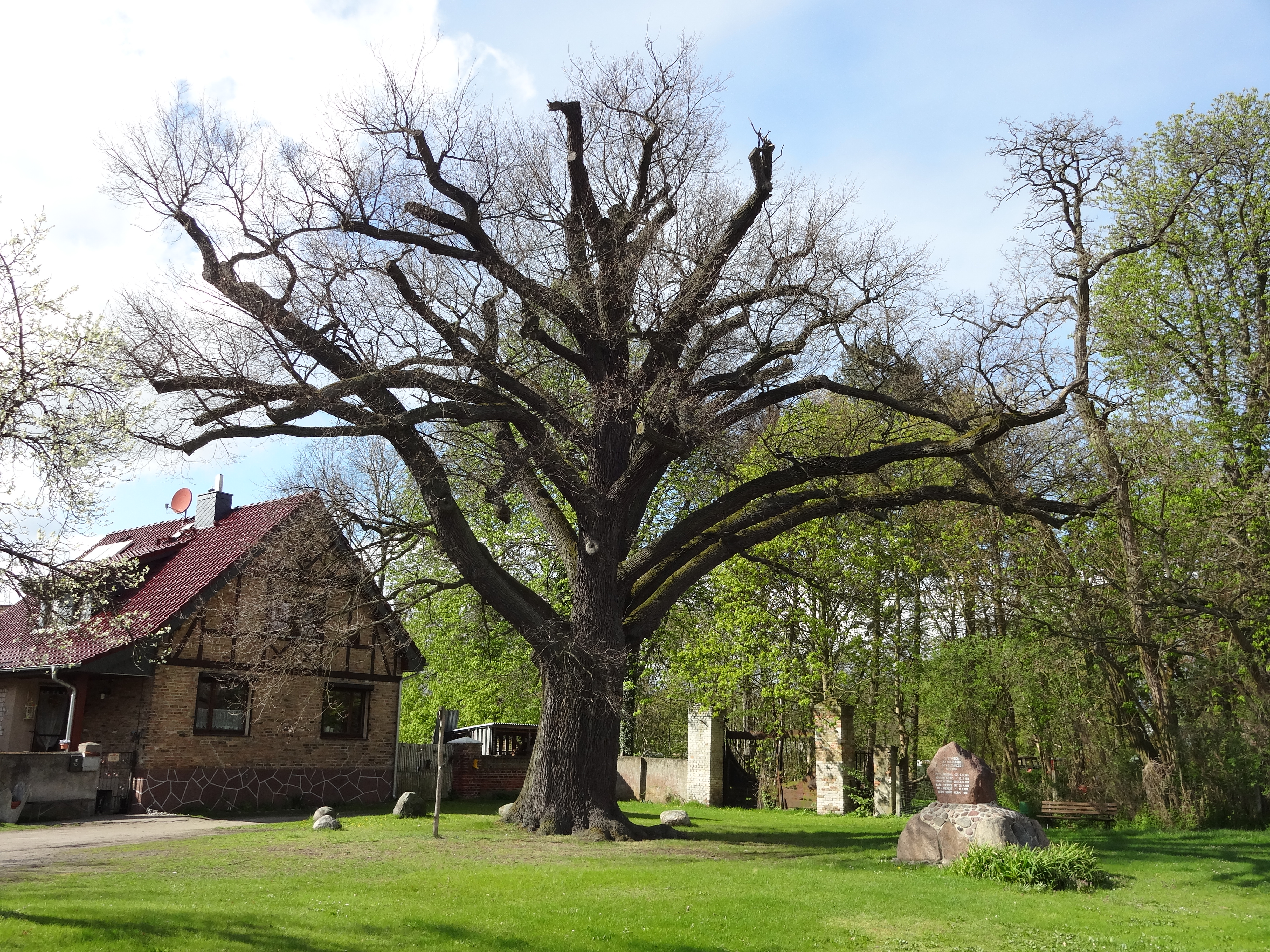 Naturdenkmal Stieleiche am Dorfplatz in Kolberg, Ortsteil der Gemeinde Heidesee; aufgenommen im April 2017